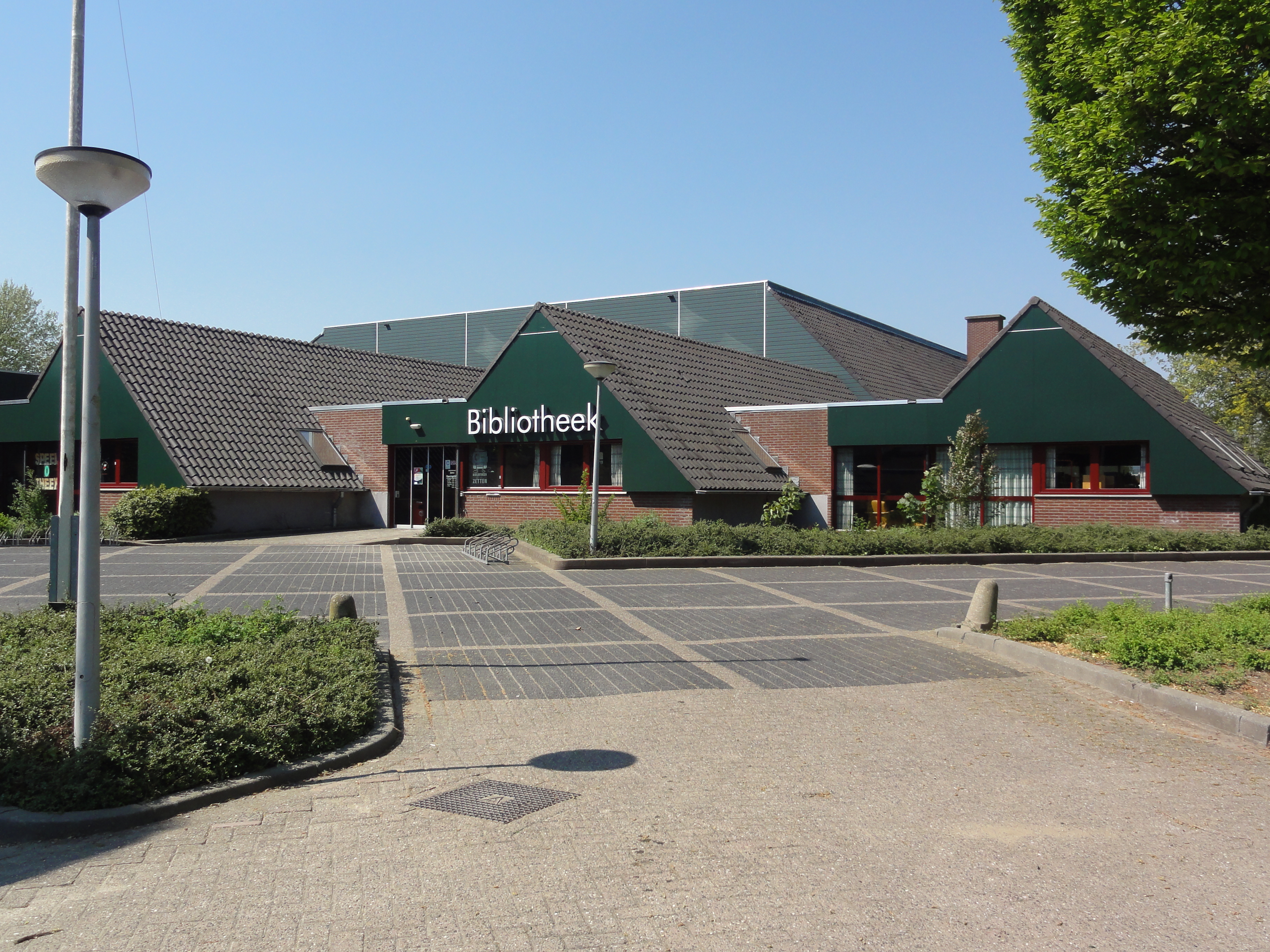 Zetten (Overbetuwe) bibliotheek